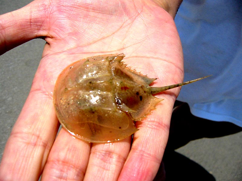 Exuvia from Limulus